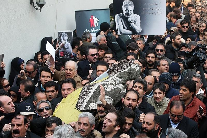 مراسم تشییع پیکر حسن جوهرچی - مراسم تشییع پیکر حسن جوهرچی بازیگر سینما و تلویزیون صبح امروز ۱۷ بهمن ماه با در خانه سینما برگزار شد.